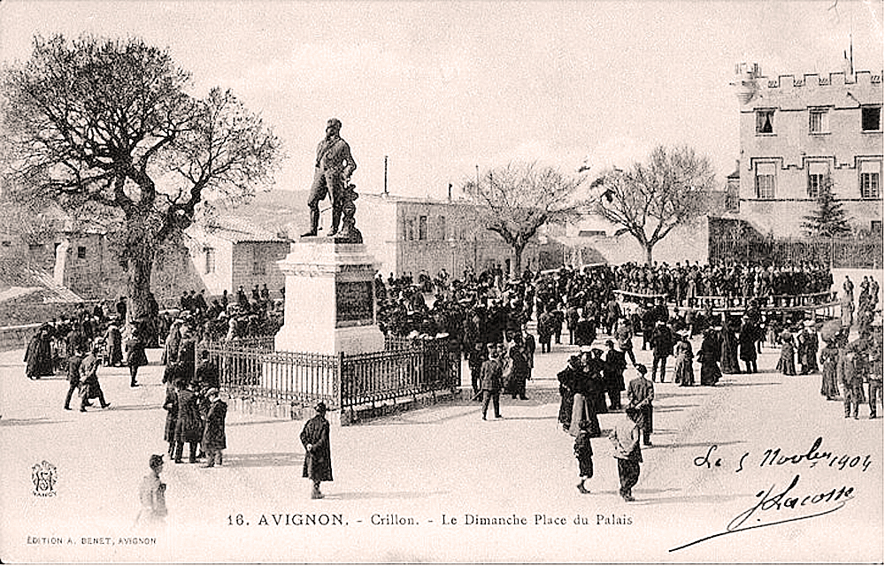 Un dimanche sur la Place du Palais d'Avignon avec au centre la statue du brave Crillon